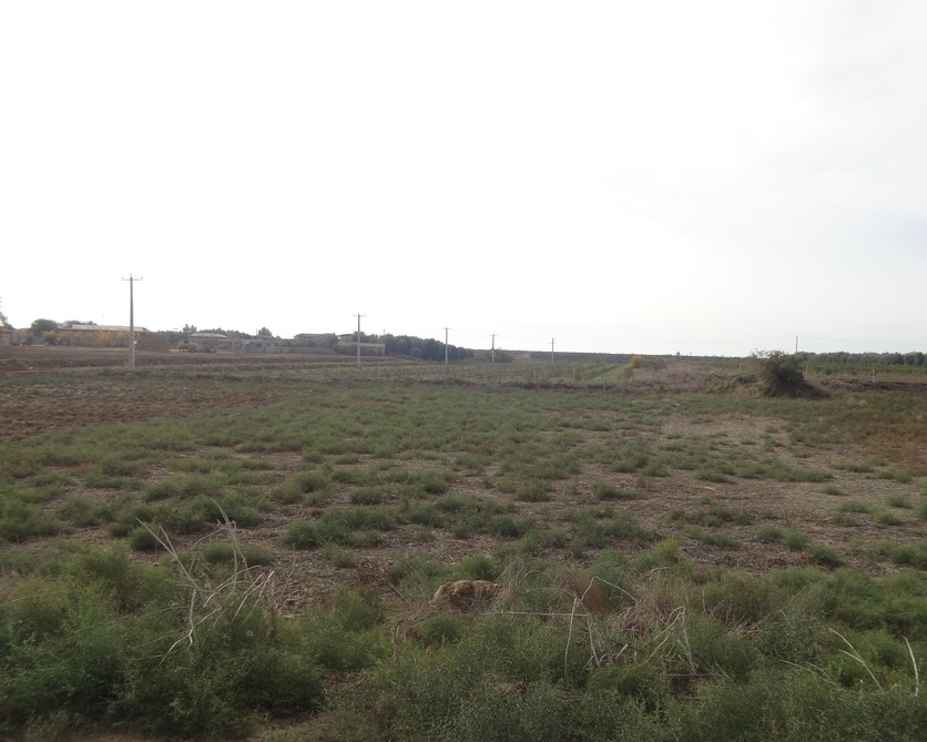 ترکمن صحرا